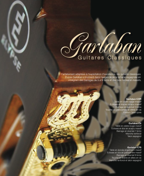 La série Garlaban Elypse